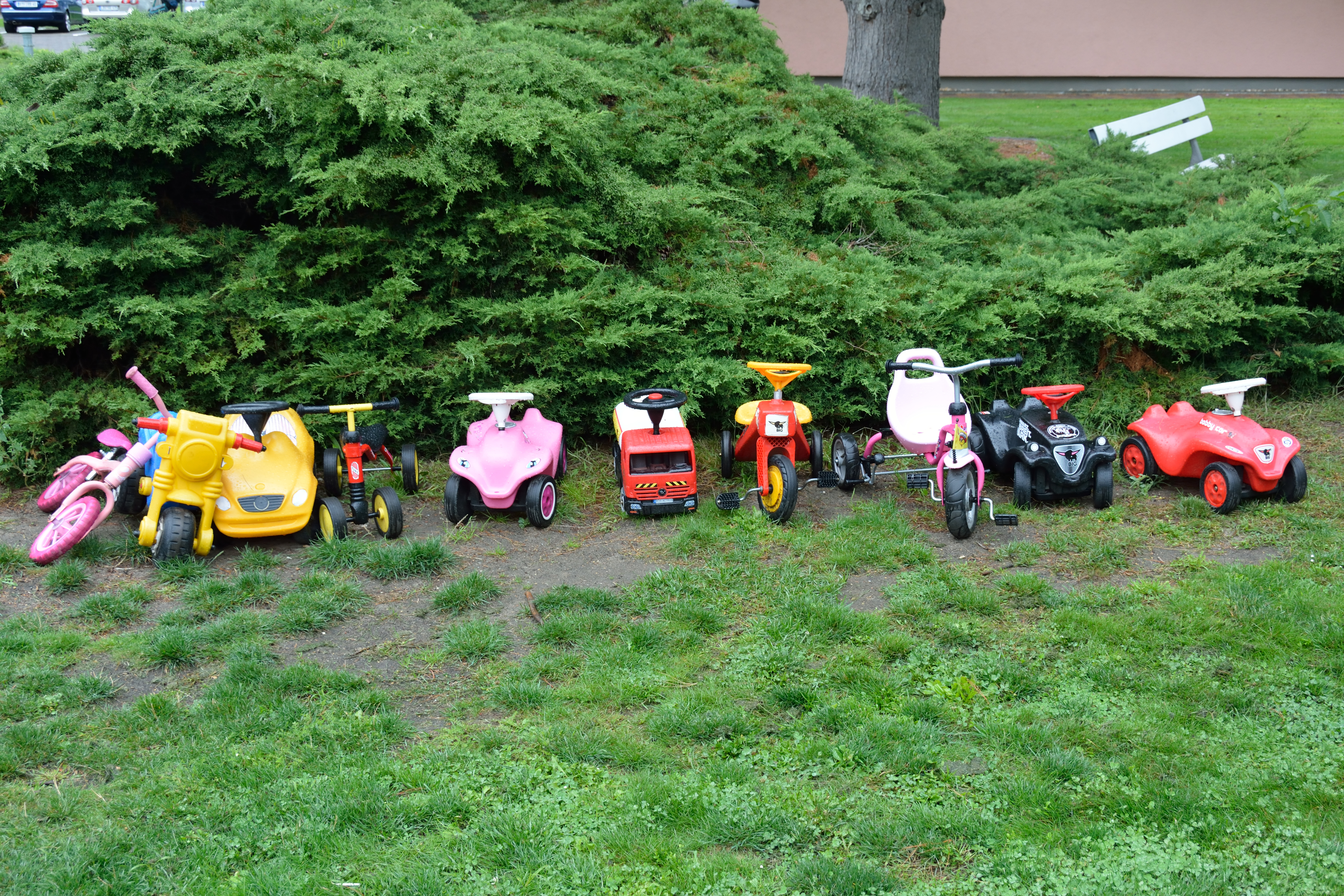 Eine Reihe von Spielautos, bereitgestellt für Kinder